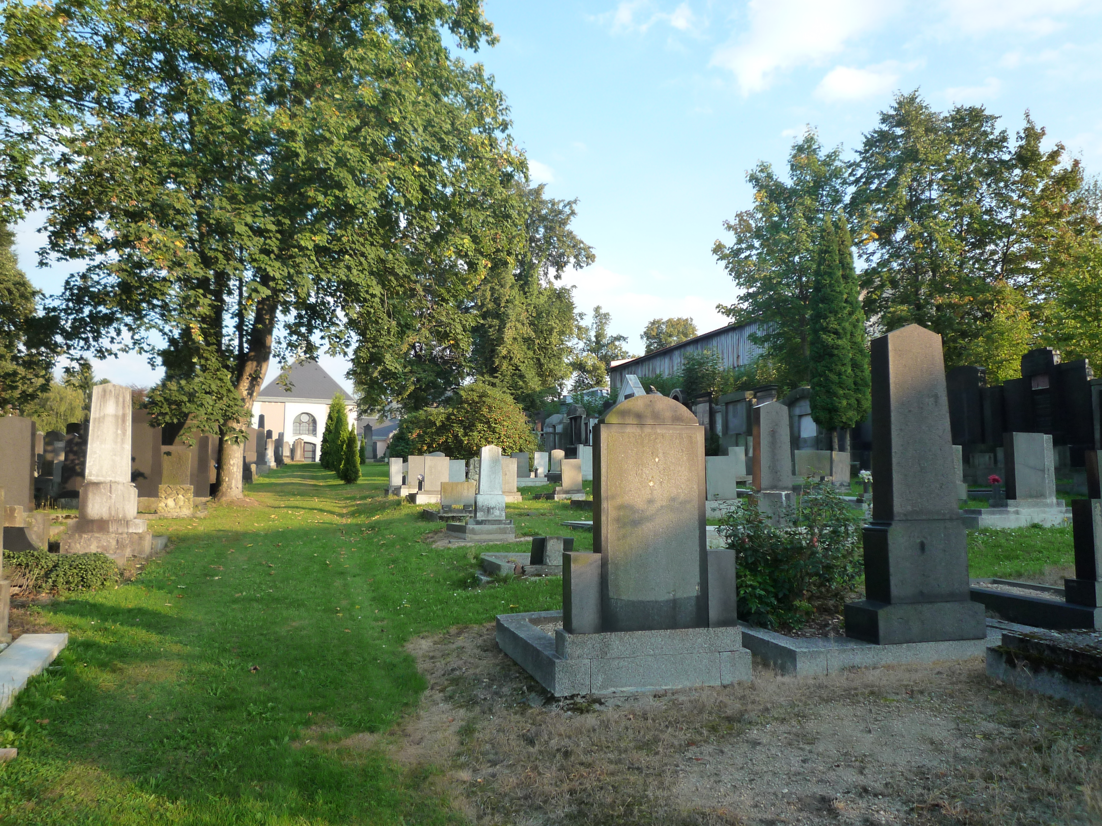 Židovský hřbitov (Liberec), ul. Ruprechtická 385, Liberec